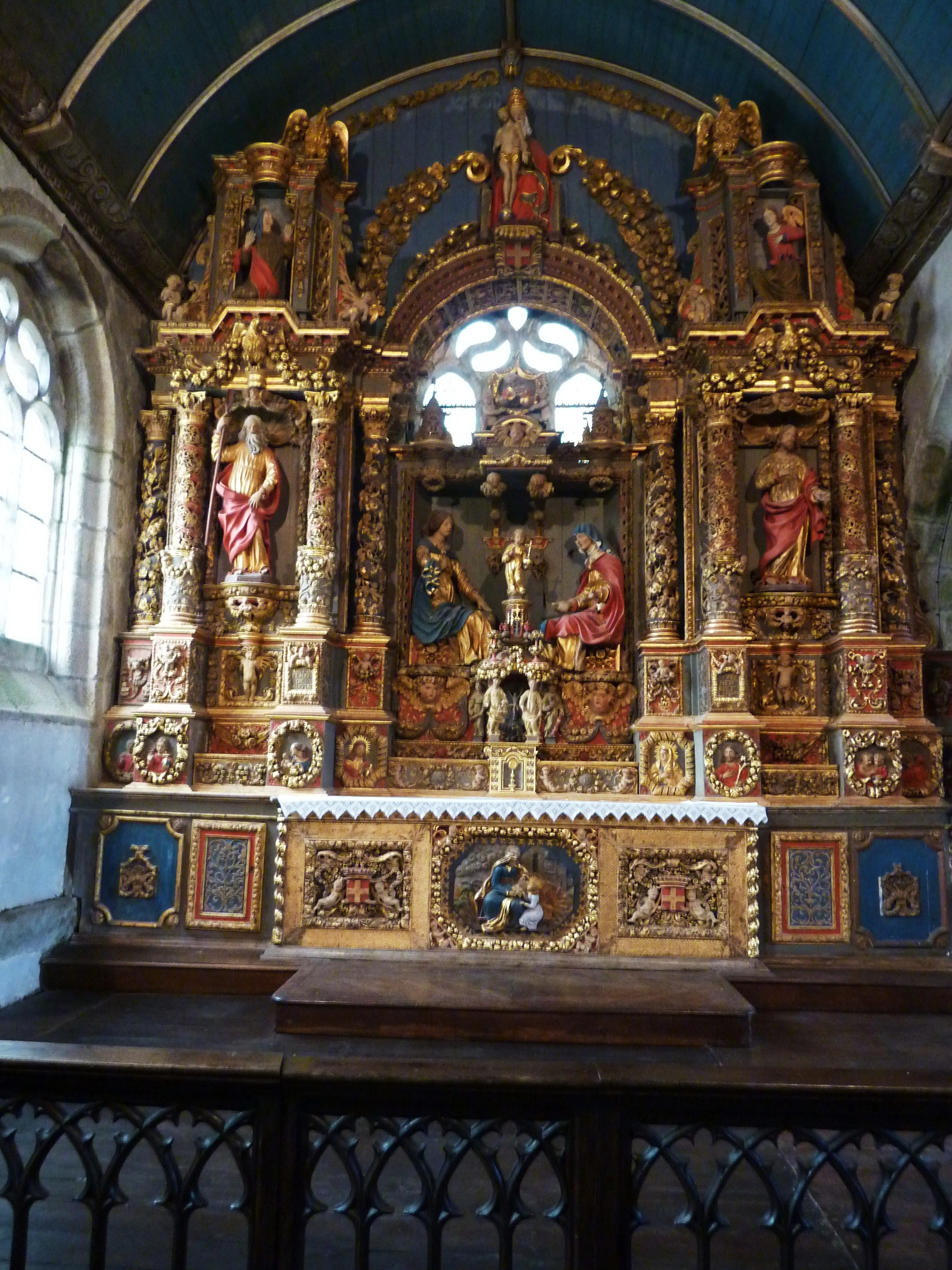 Commana Le retable de Sainte Anne XVIIIème baroque transept nord